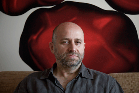 Artista